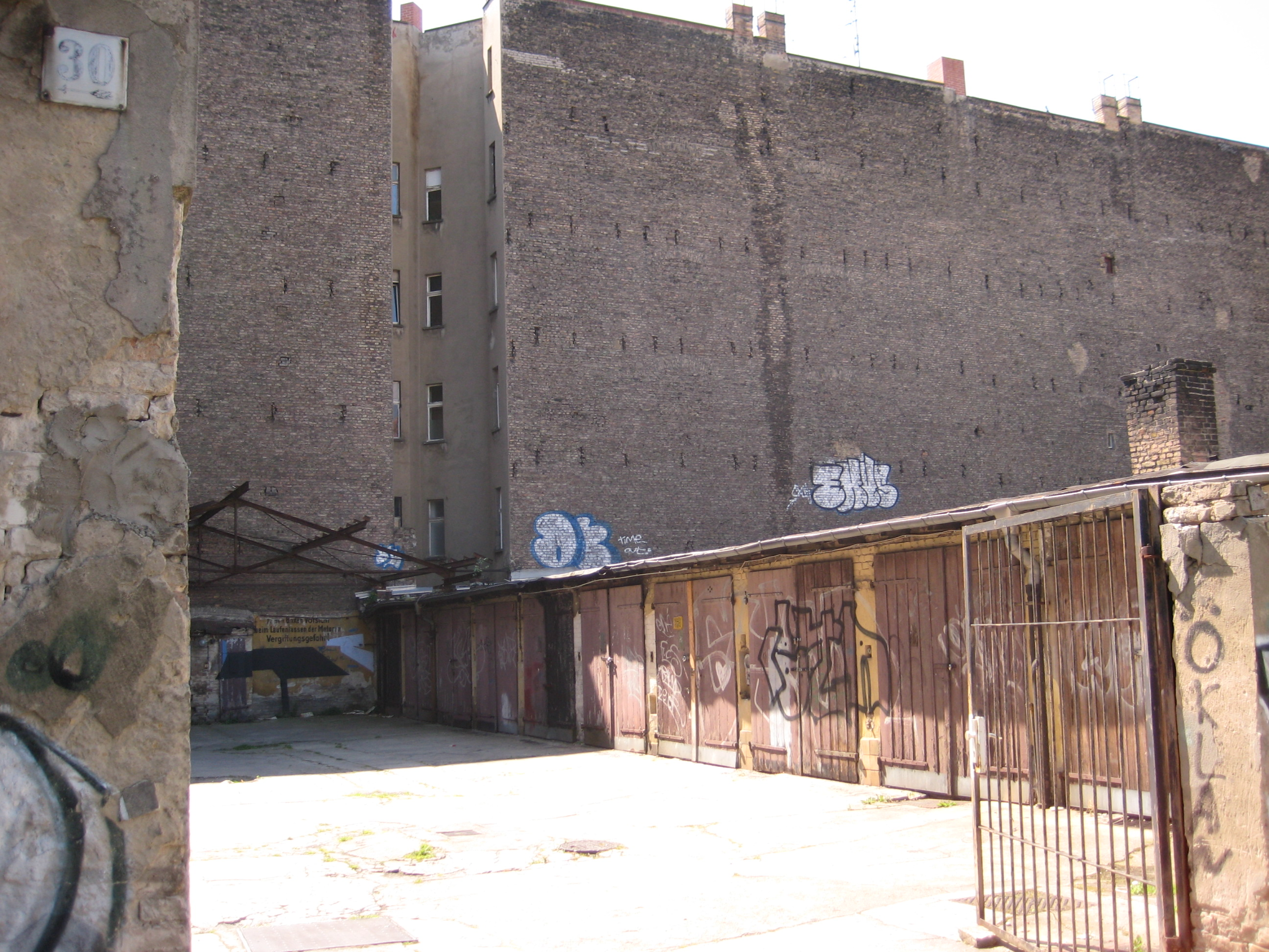 Unsanierter Hof in der John-Schehr-Straße in Berlin-Prenzlauer Berg